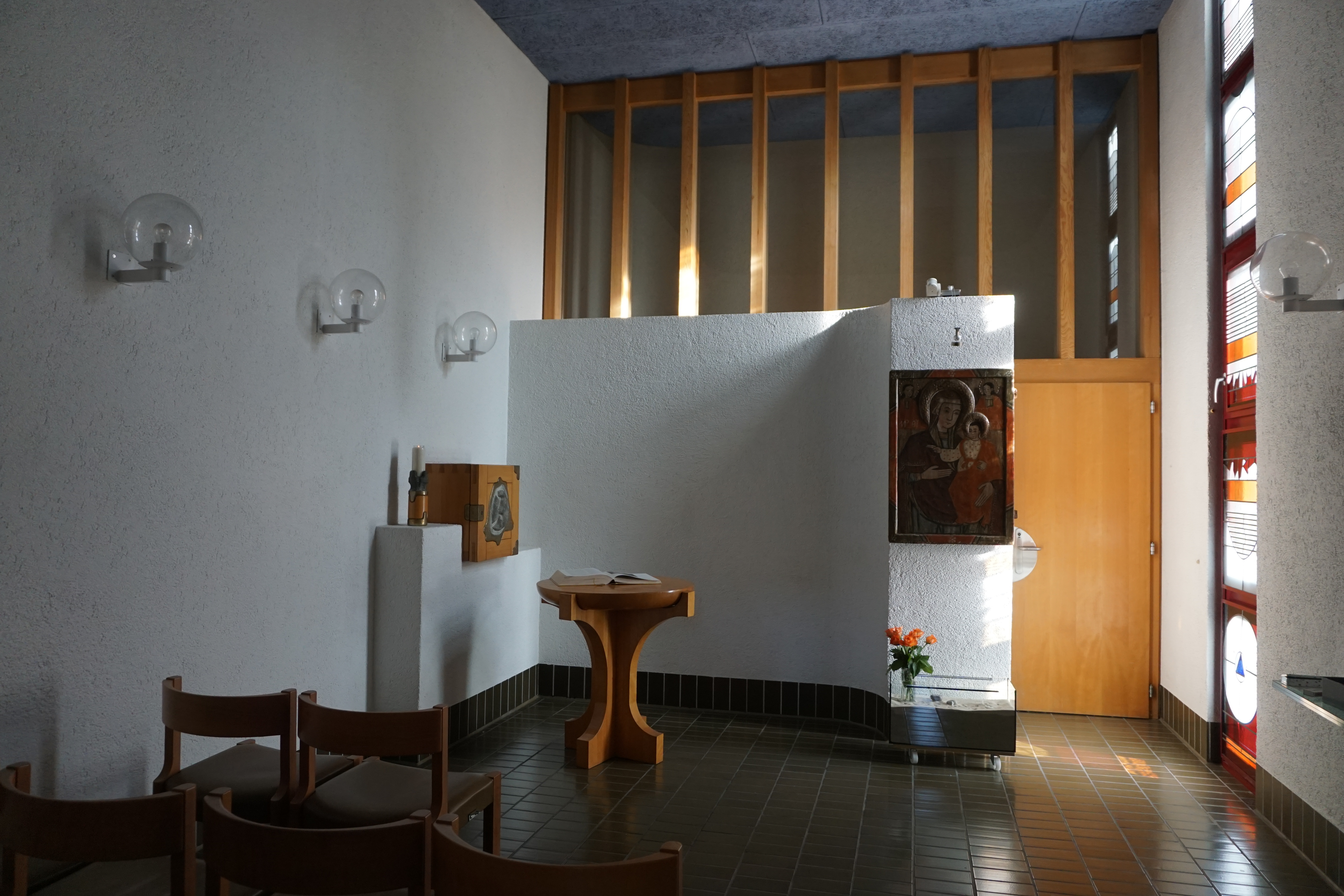 Oekumenisches Zentrum St. Andreas in Kehrsatz, Andachtsraum